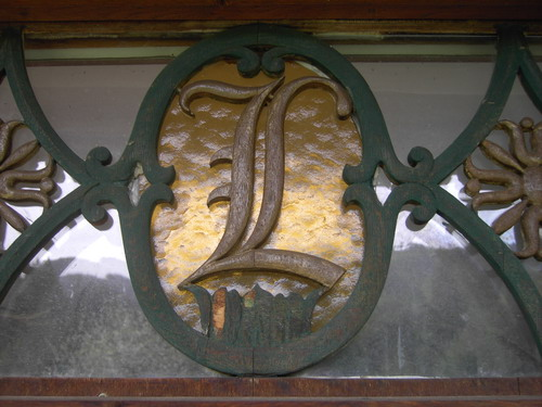 Ludwig II. Initiale am Forsthaus Altlach am Walchensee